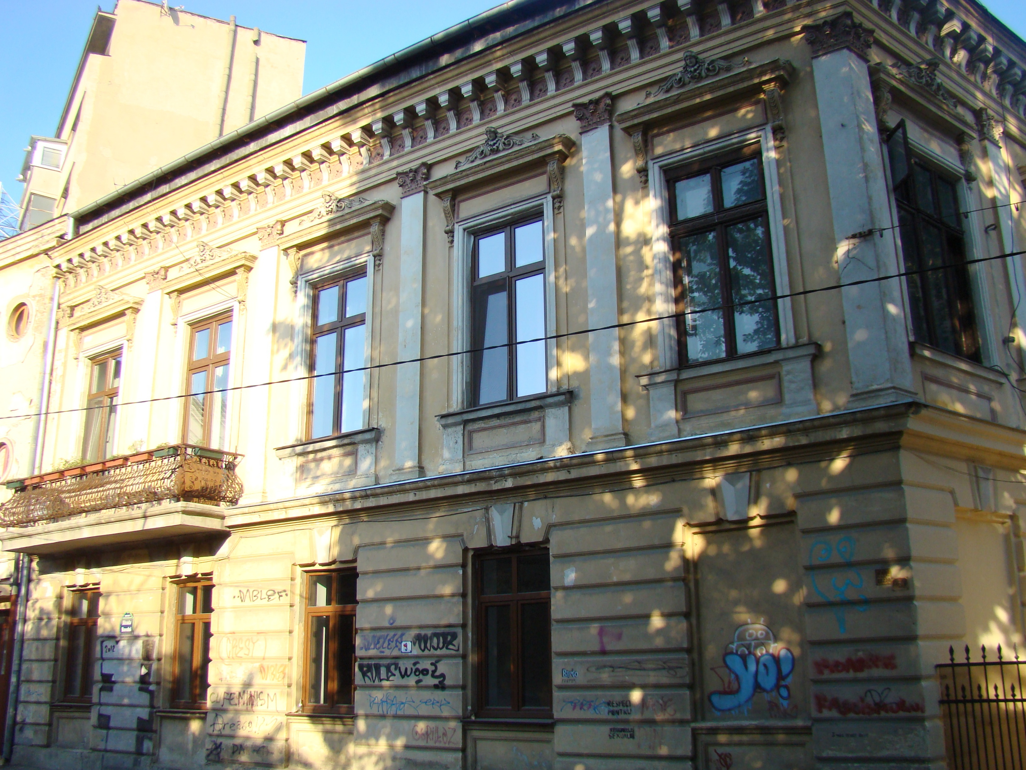 Casă monument istoric, str.Banului, nr.3